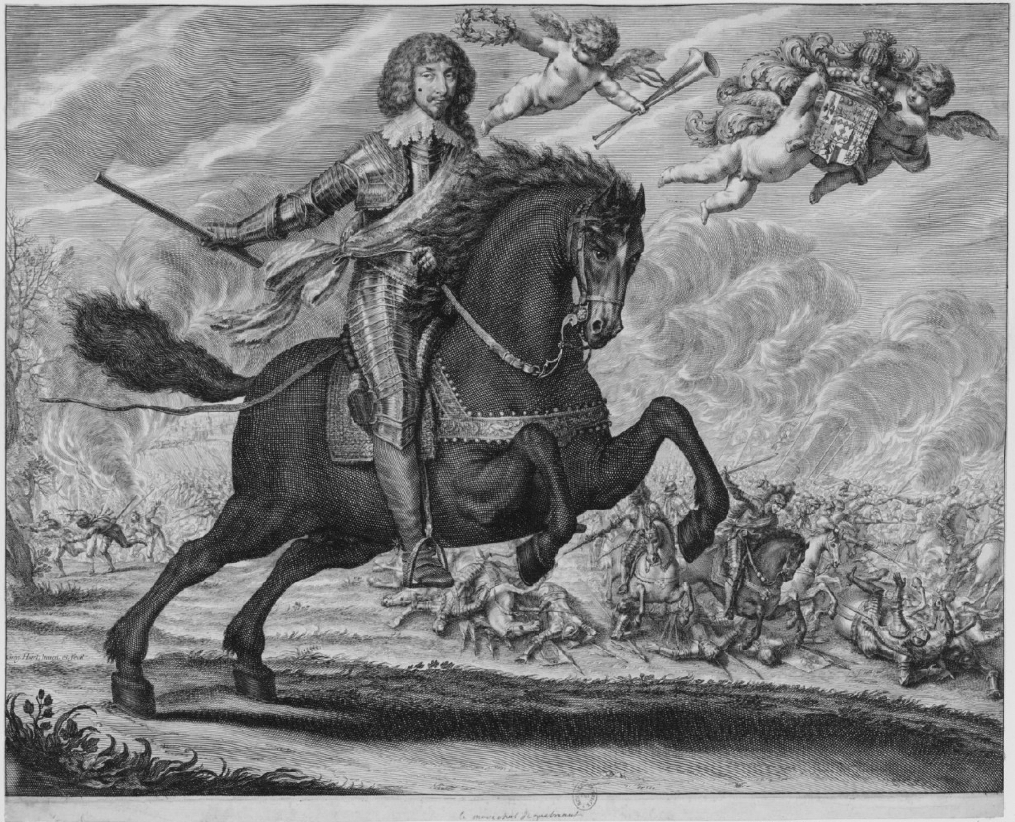 Jean-Baptiste Budes de Guébriant (1602-1643), maréchal de France